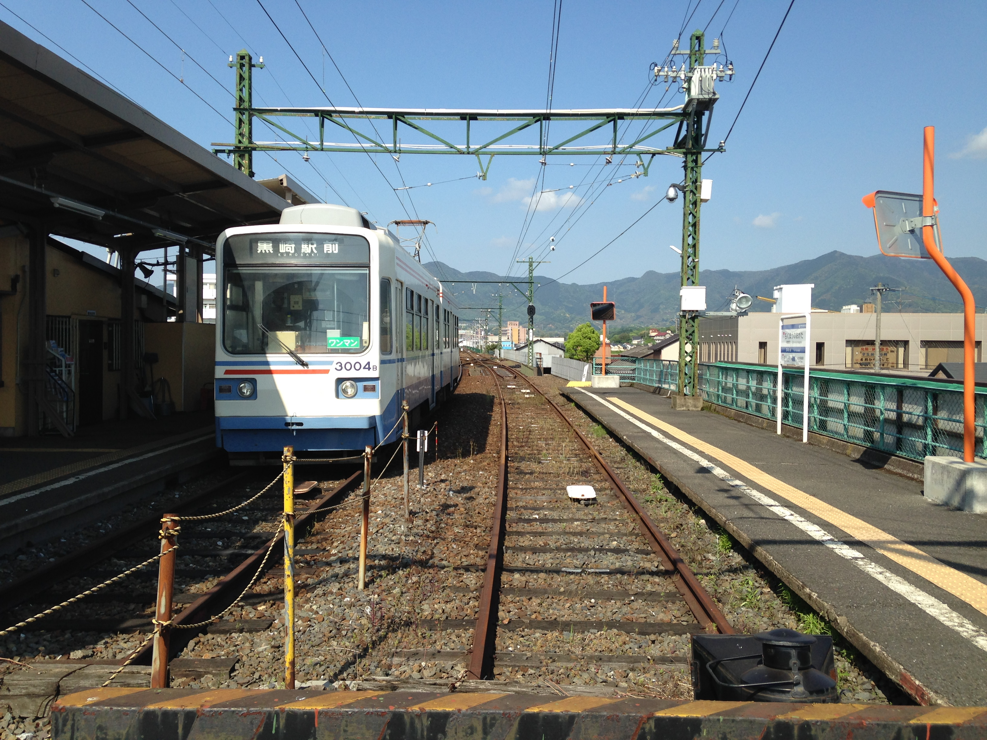 筑豊直方駅のホーム